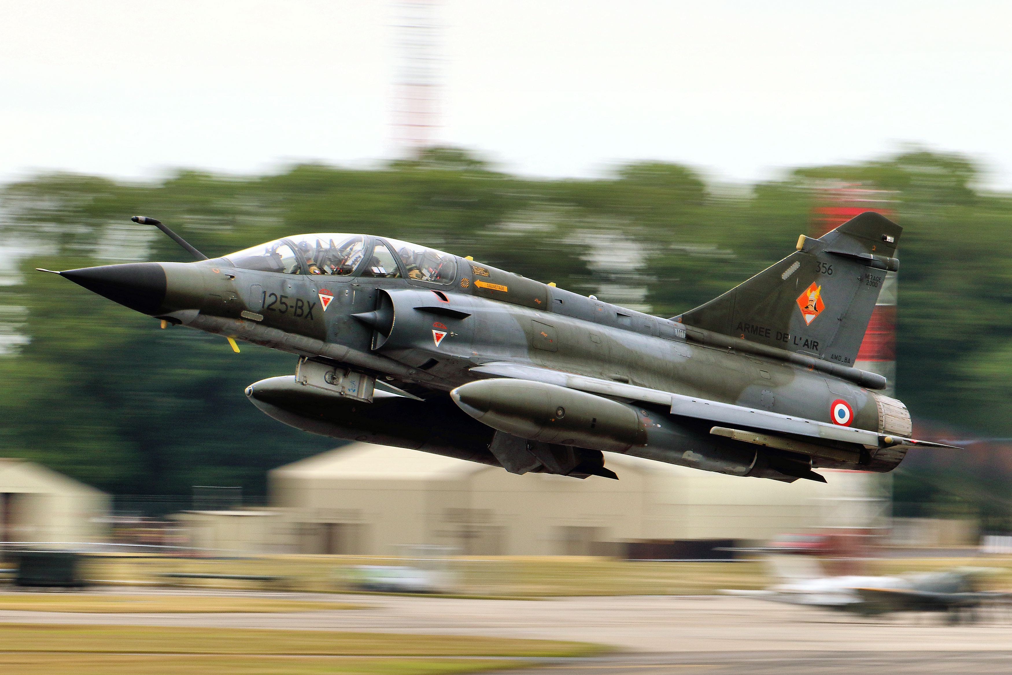 Mirage 2000N - RIAT 2015